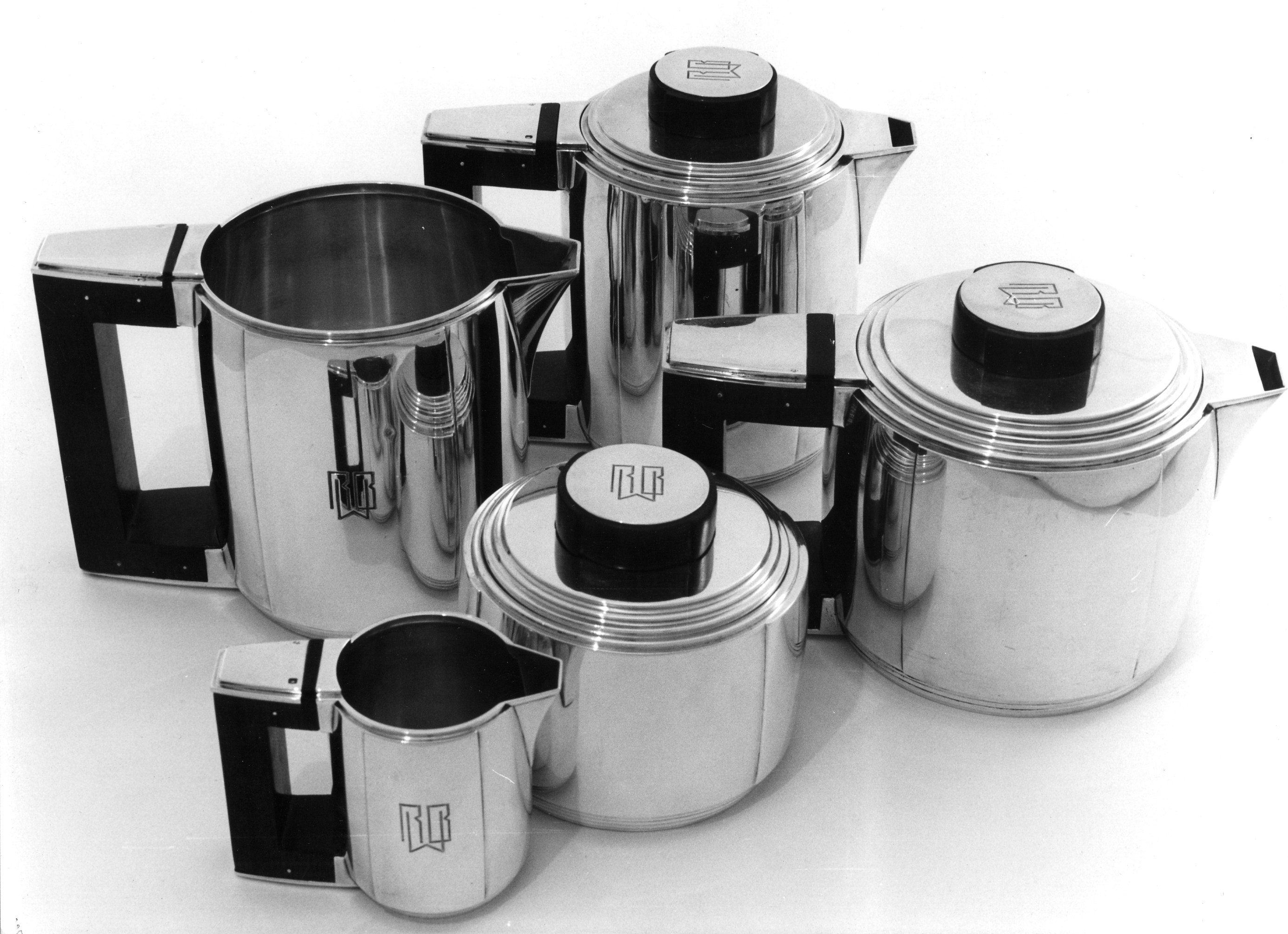 Teeservice (Silber und Teak) - Jean Puiforcat